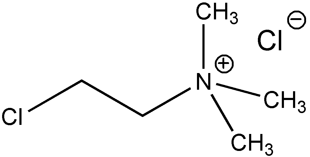 Struktur von Chlorcholinchlorid